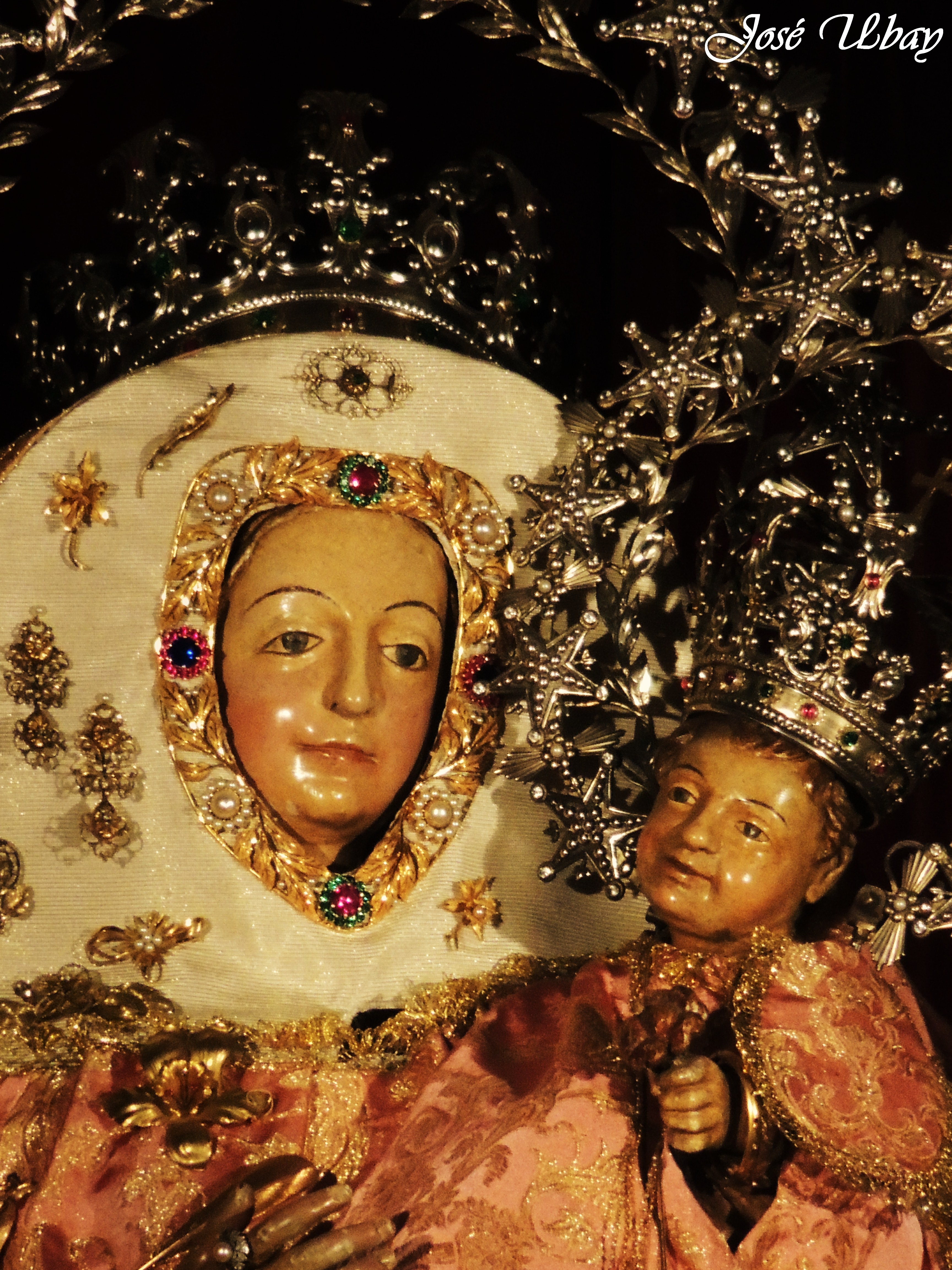 Nuestra Señora del Pino. Siglo XV. Jorge Fernández Alemán. Basílica de Nuestra Señora del Pino. Villa Mariana de Teror.